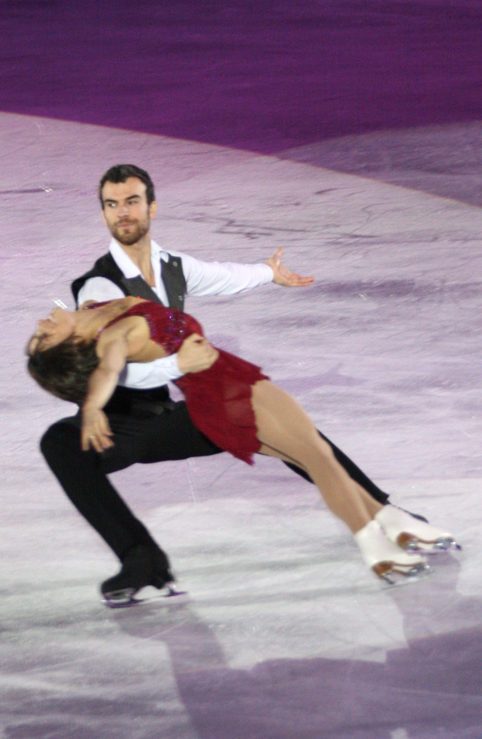 Мэган Дюамель и Эрик Рэдфорд (Канада) на показательных выступлениях в финале Гран-при по фигурному катанию 2015-2016.